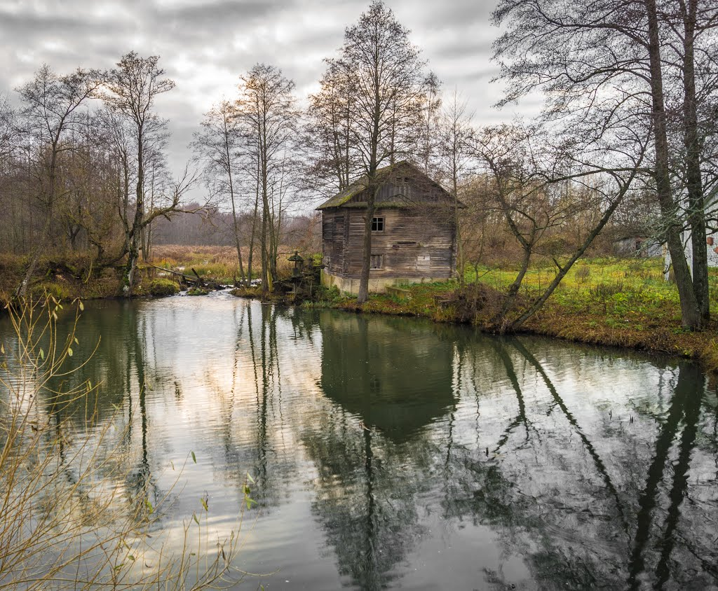 Наква. Стары млын